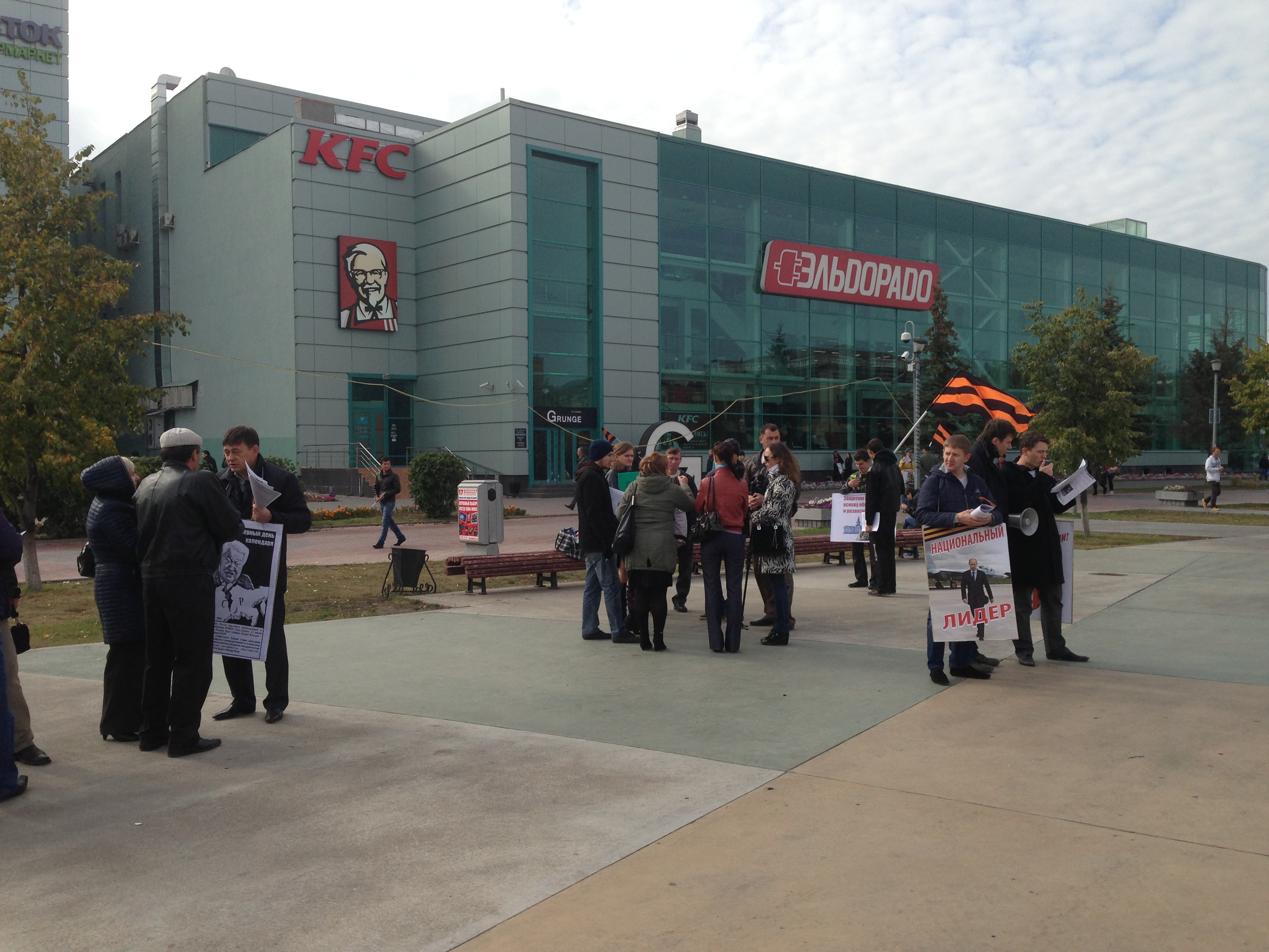 Demonstracio de la Nacia Liberiga Movado sur Placo de Unueco kaj Konsento. Tjumeno, Rusio.